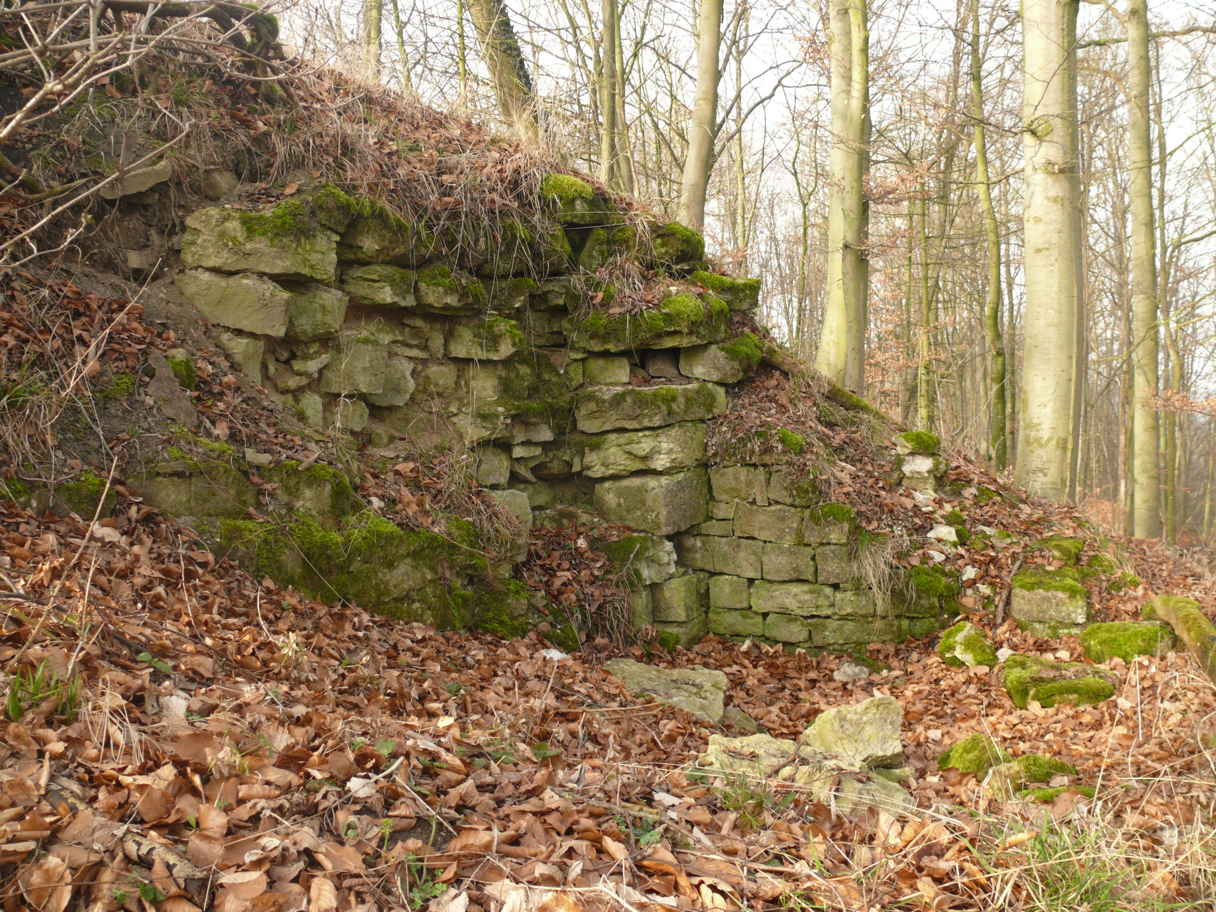 abgegangene Burg Bielriet, Mauerreste